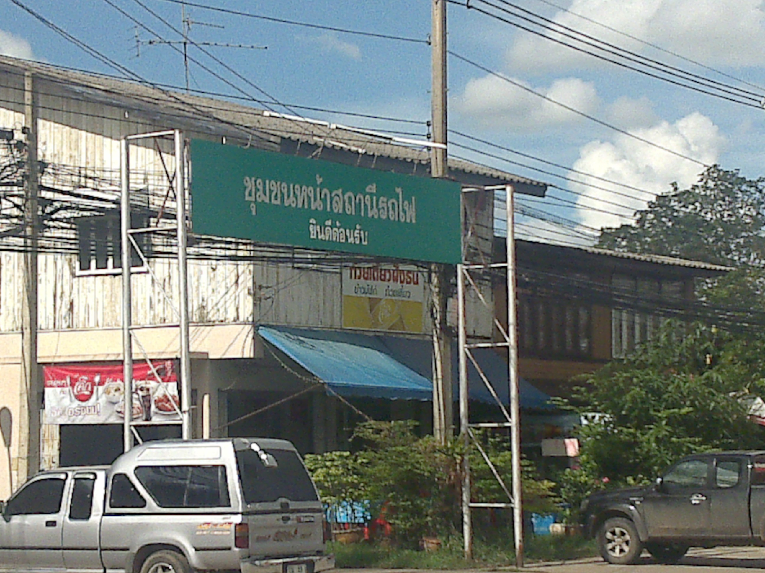 Chumchon in Buriram.